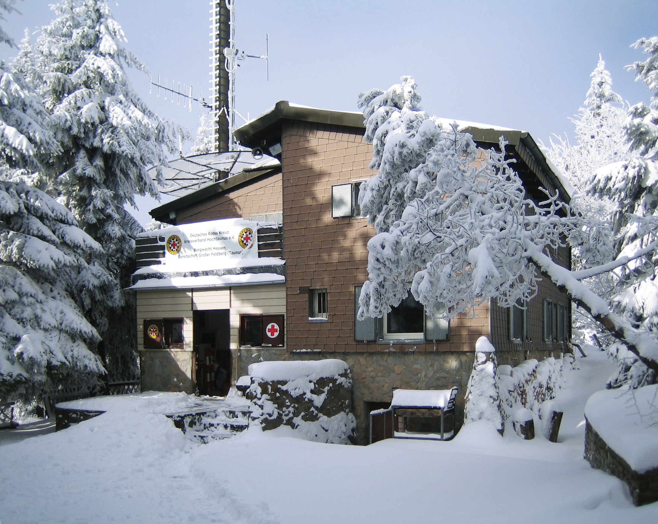 DRK Bergwacht Rettungsstation auf dem Großen Feldberg im Taunus im Winter 2005